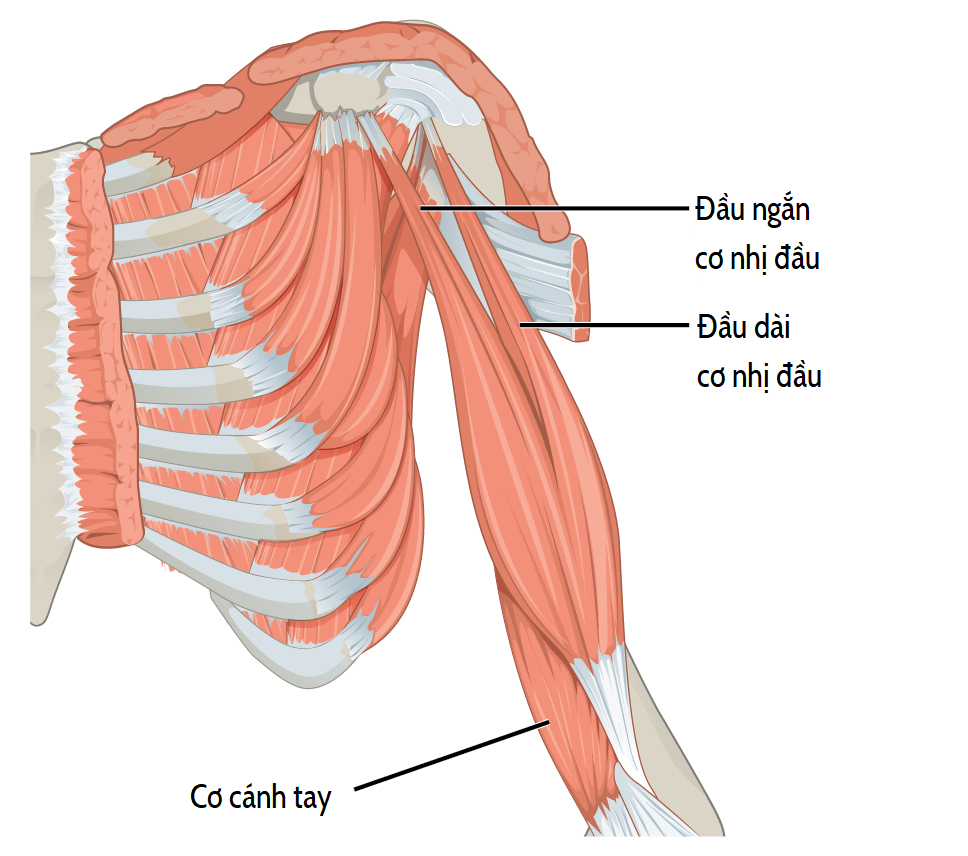 Bởi CFCF – Tác phẩm do chính người tải lên tạo ra, CC BY-SA 4.0 , Liên kết